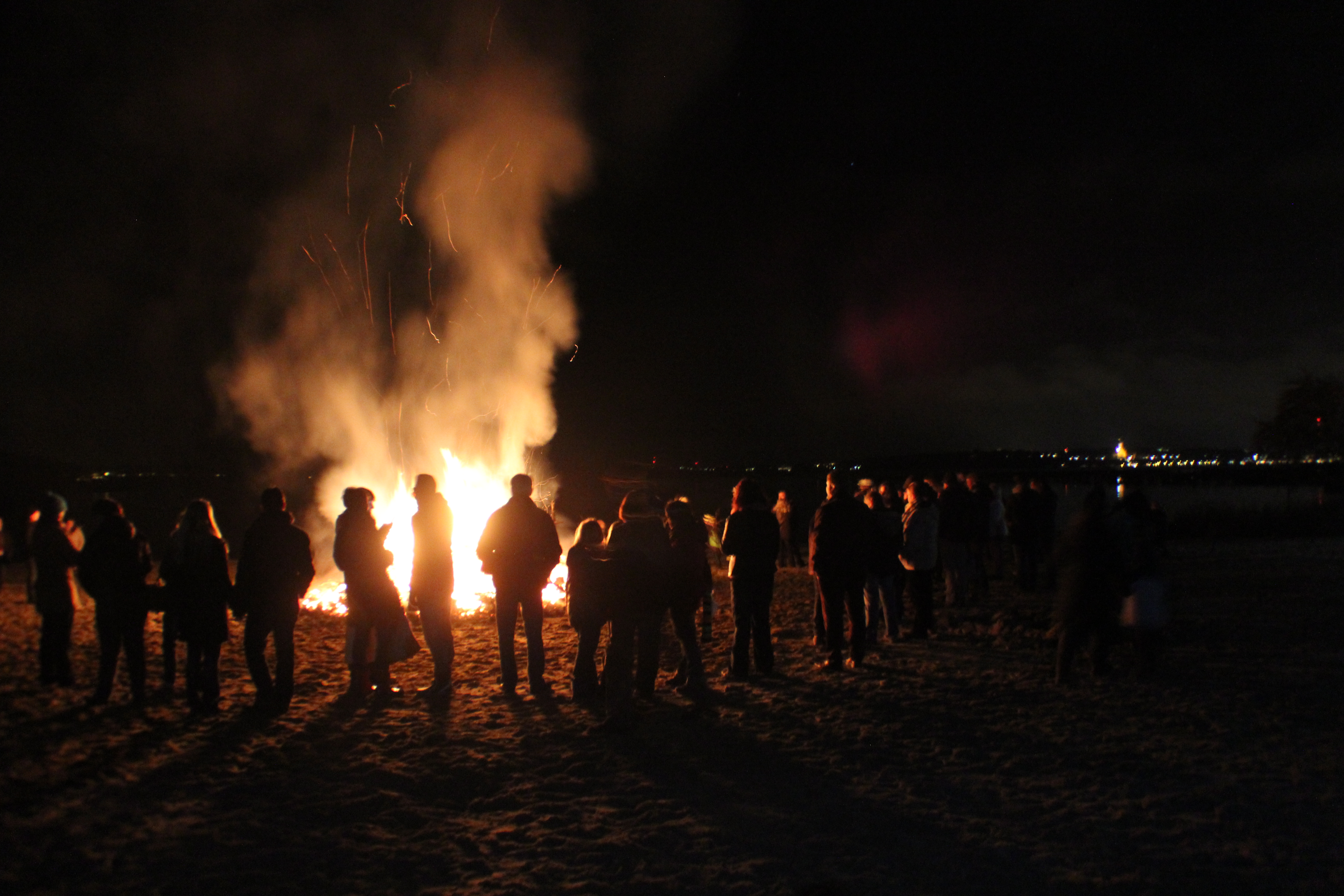 Biikebrennen in Wassersleben (2014), nach der Entzündung